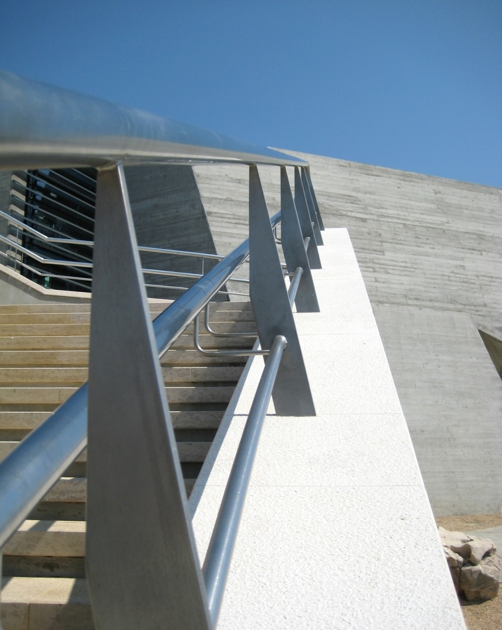 Astronomski centar u Rijeci na brdu Sveti Križ. Dana 18. svibnja 2001. godine članovi Akademskog astronomskog društva Rijeka, astronomi amateri i građani, dobili su Riječku zvjezdarnicu.